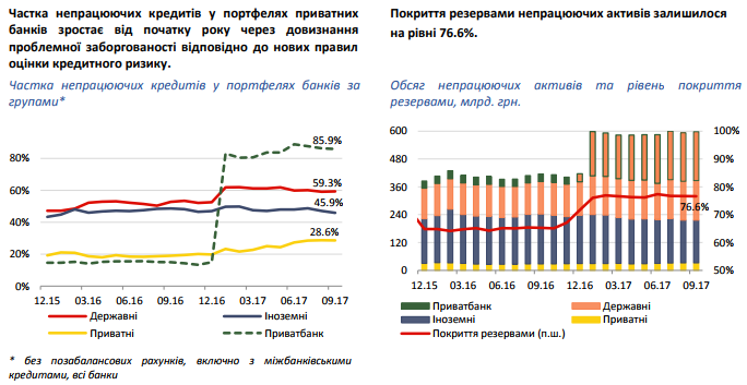 Частка непрацюючих кредитів у портфелях приватних банків та покриття їх резервами протягом 2015-2017 рр.